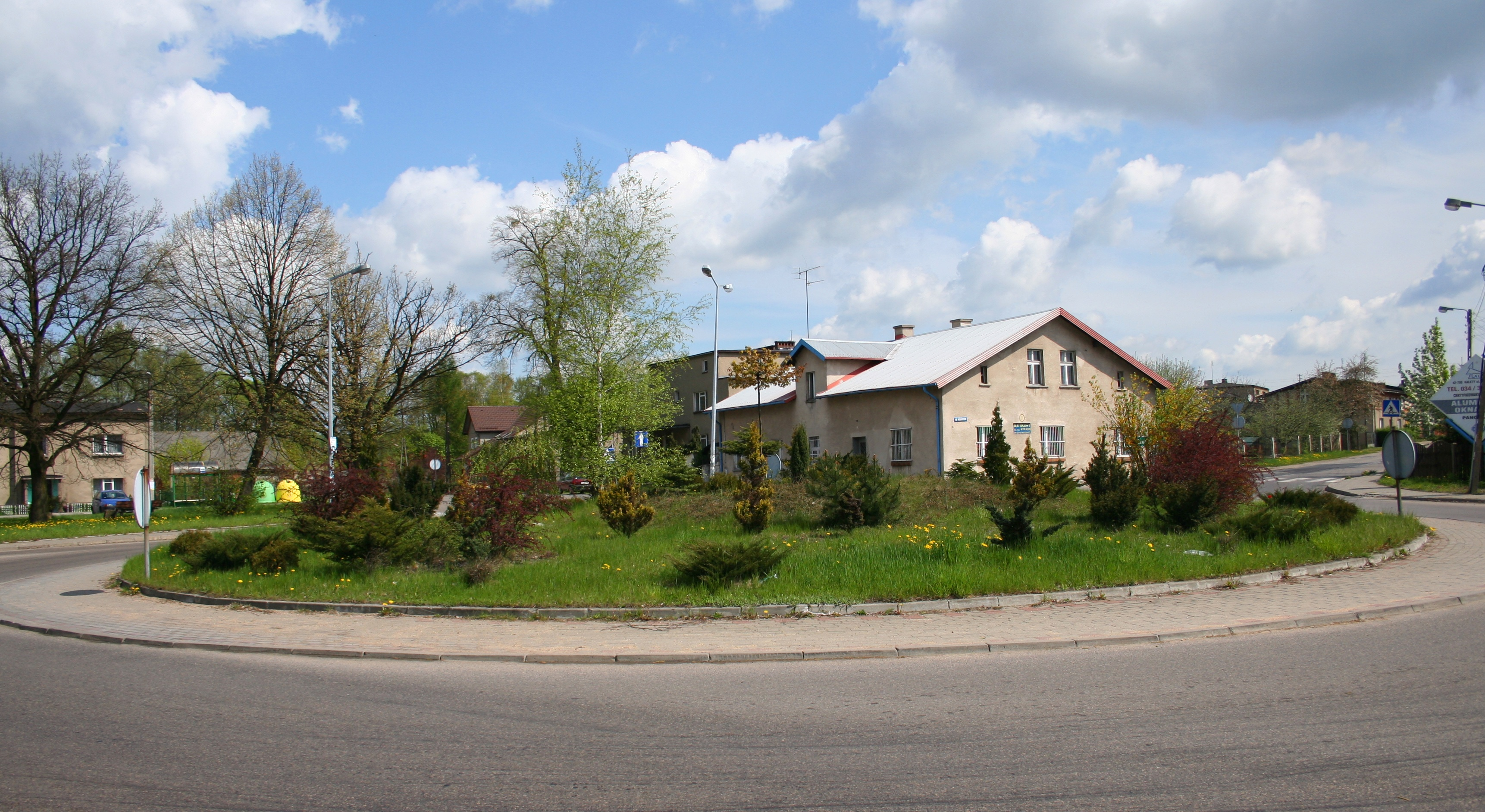 Rondo w Piasku, Polska, województwo śląskie, powiat lubliniecki